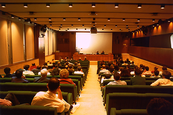 Scuola Superiore Guglielmo Reiss Romoli: auditorium